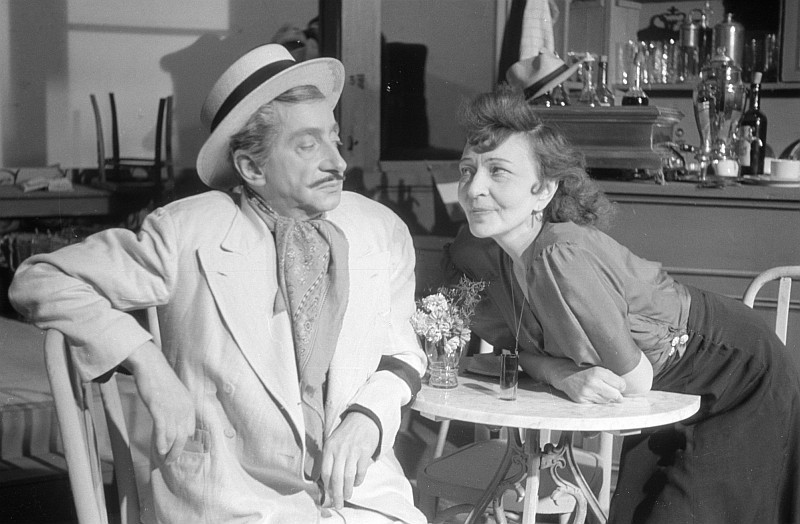 Original image description from the Deutsche Fotothek Szenenbilder & PorträtMarlise Ludwig in der Rolle der Honorine (rechts)